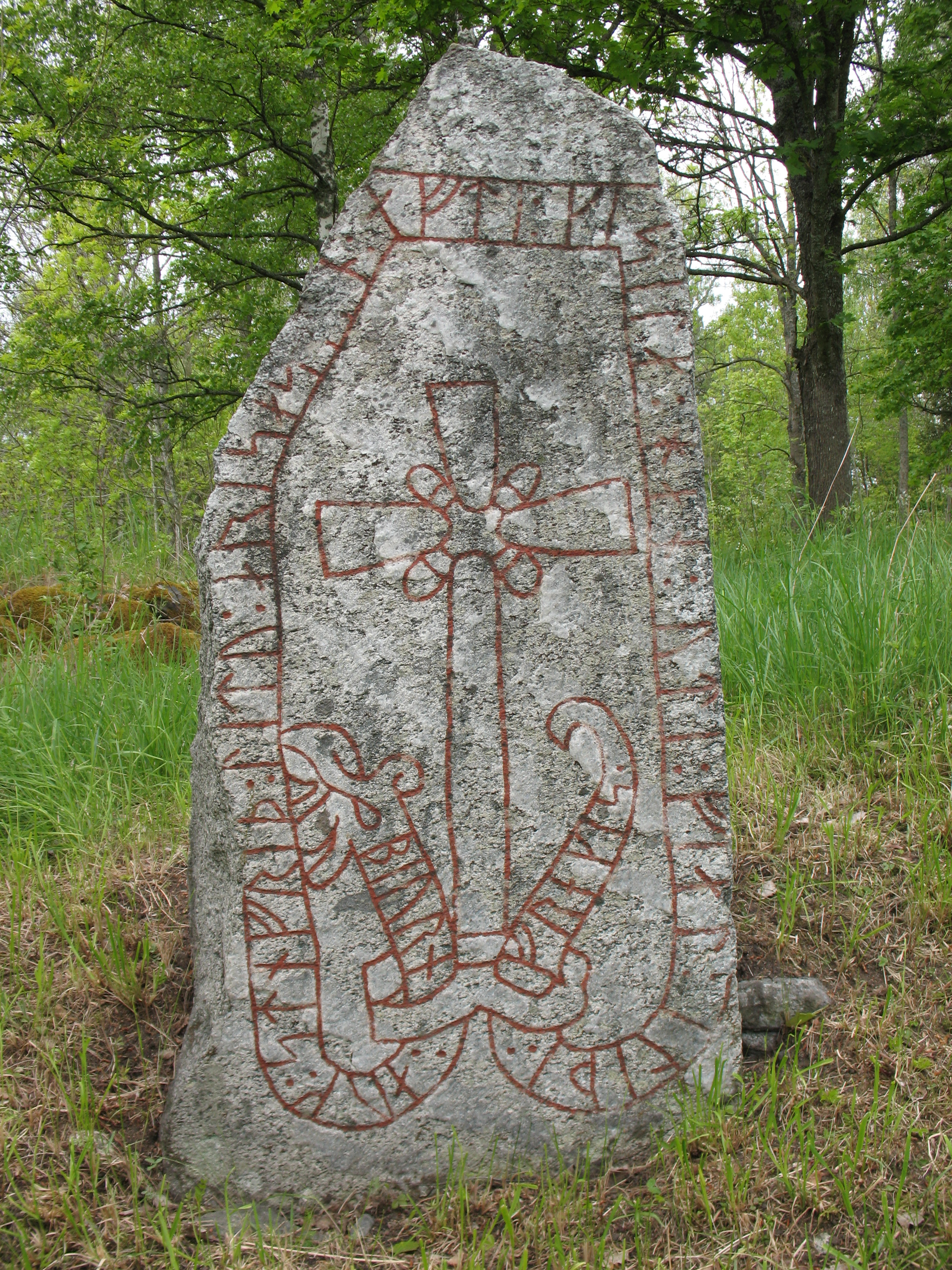 runestone